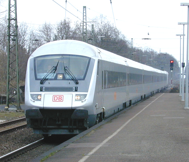 DB Metropolitan onderweg van Keulen naar Hamburg te Dülmen.